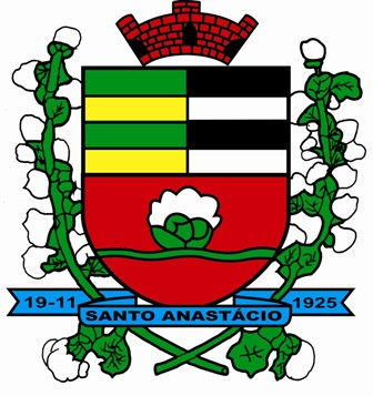 Bandeira de Santo Anastácio, estado de São Paulo, Brasil